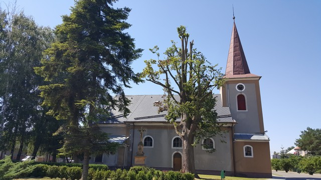 Babice